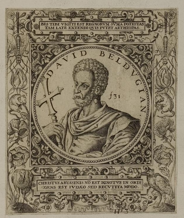 Grafik aus dem Klebeband Nr. 1 der Fürstlich Waldeckschen Hofbibliothek Arolsen Illustration aus: Georg Greblinger: Wahre Abbildungen der Türckischen Kayser vnd Persischen Fürsten / so wol auch anderer Helden und Heldinnen von dem Osman / biß auf den andern Mahomet. Johann Ammon, Frankfurt 1648 Motiv: "David Beldugian" (Dawid II., Kaiser von Äthiopien)